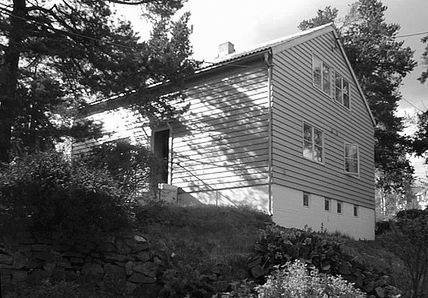 Olav Selvaags Ekeberghuset